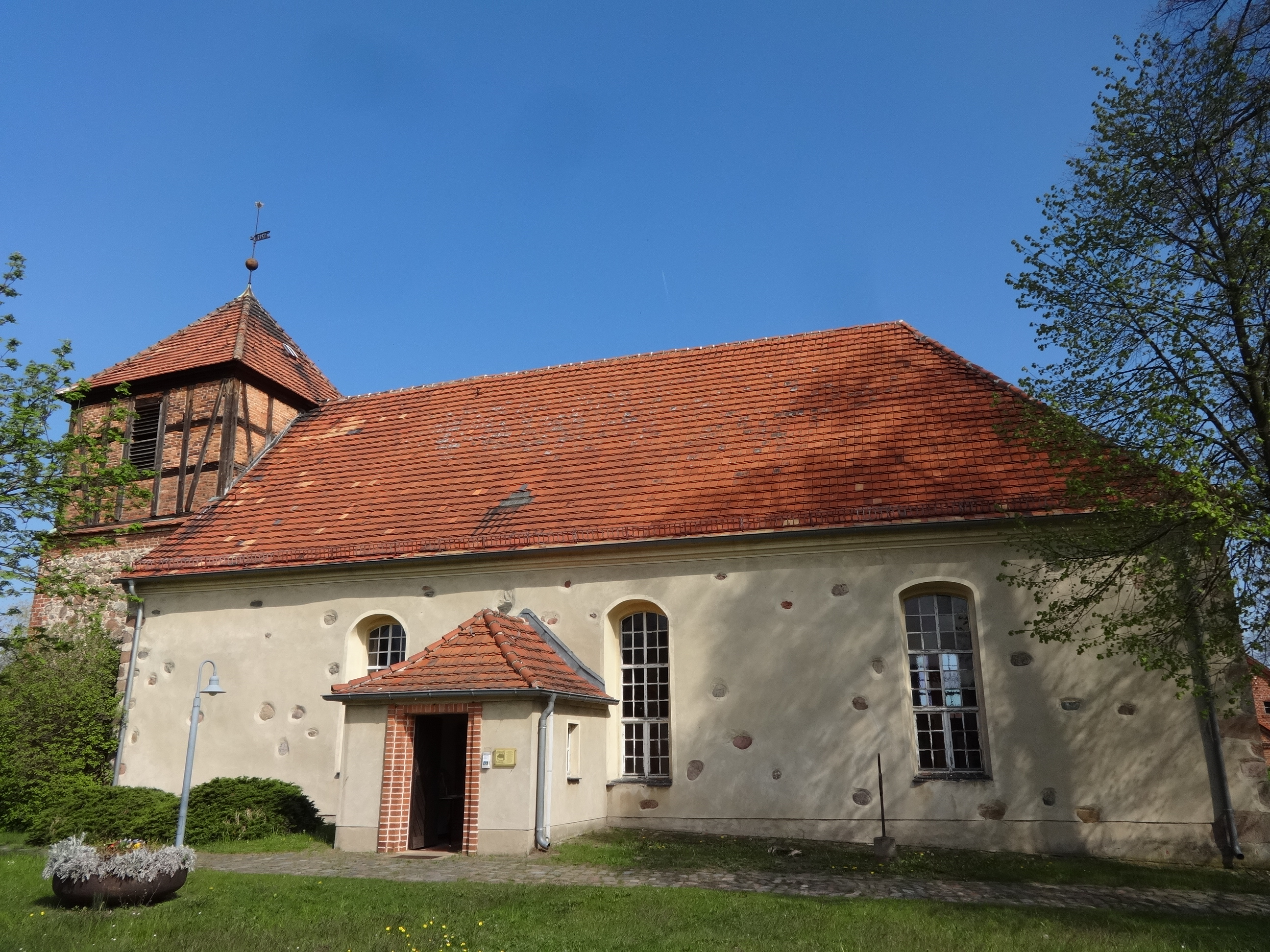 Die evangelische Dorfkirche in Reichenwalde wurde am Ende des 13. Jahrhunderts als Feldsteinkirche errichtet. In der zweiten Hälfte des 18. Jahrhunderts erfolgreichen zahlreiche Umbaumaßnahmen. Dabei wurden unter anderem der Westturm um ein barockes Geschoss in Fachwerk aufgestockt und die Fenster vergrößert. Im Innern befinden sich ein Altarkreuz aus Reddern sowie eine Grueneberg-Orgel von 1864 mit einem dreiteiligen Prospekt.